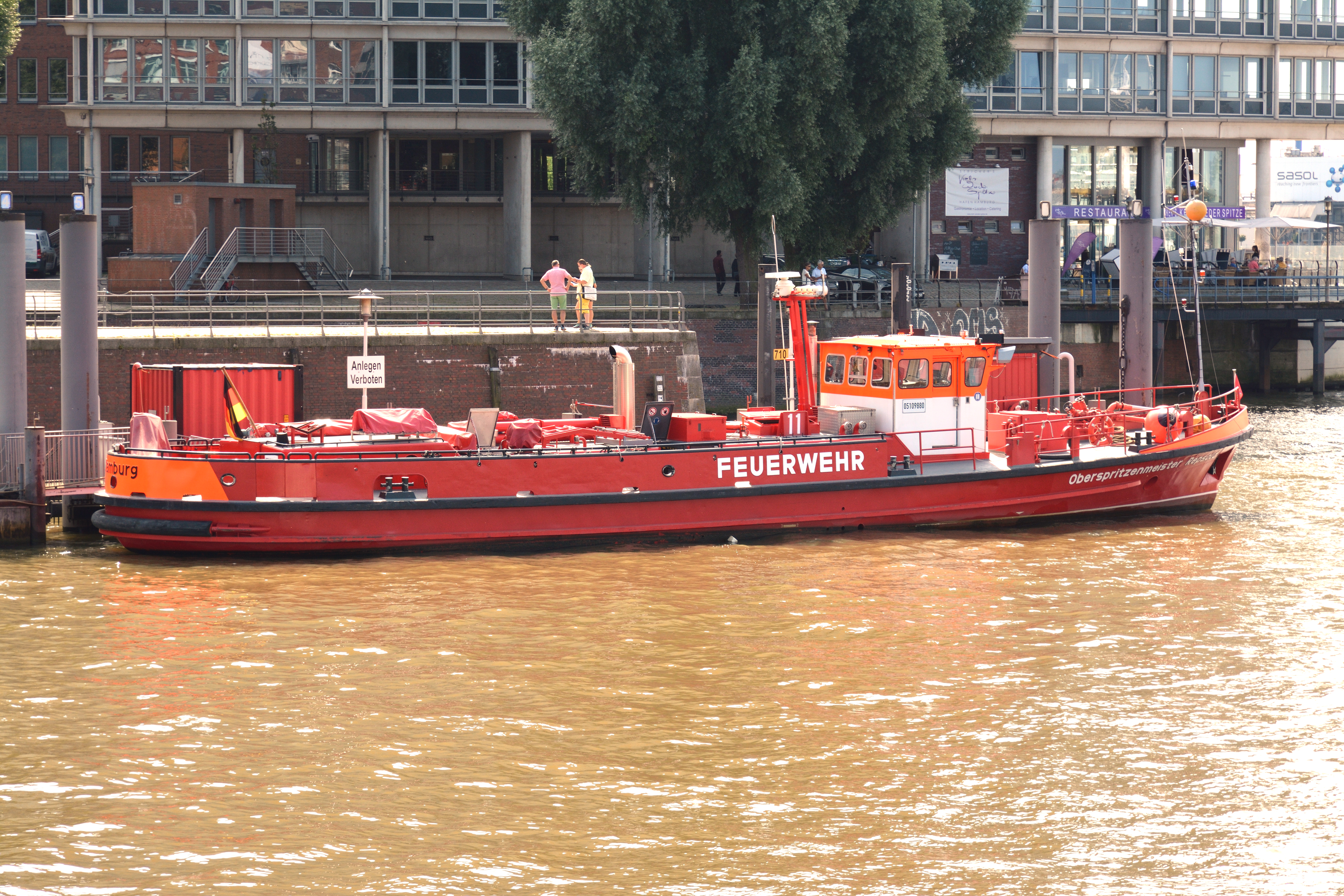 Impressionen einer Barkassenfahrt im August 2016 durch den Hamburger Hafen. Die "Oberspritzenmeister Repsold" vor der Niederbaumbrücke